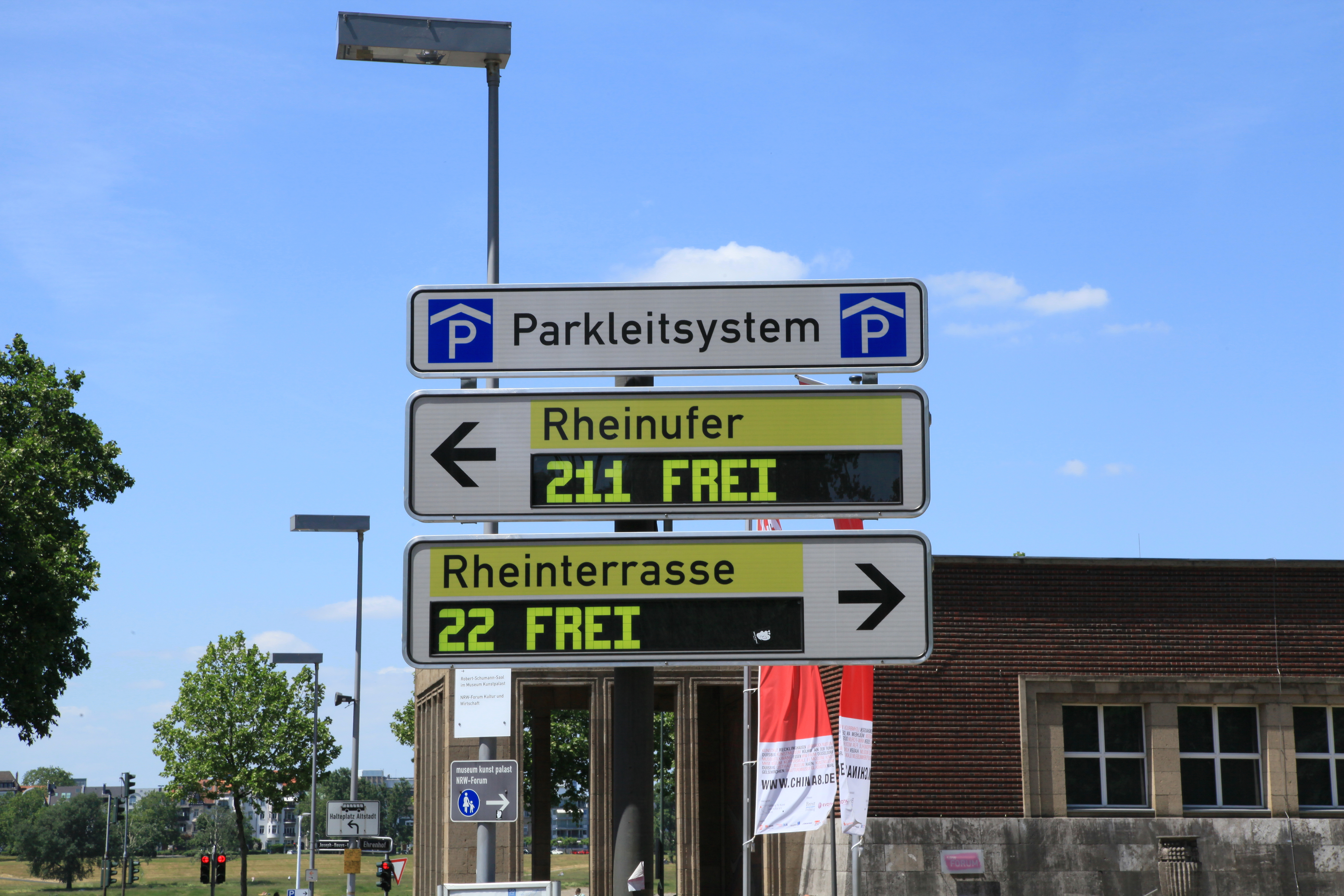 Oederallee in Düsseldorf